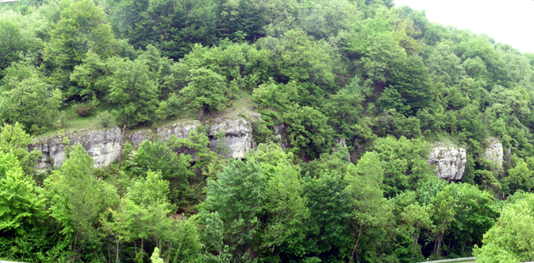 Yacimiento arqueológico